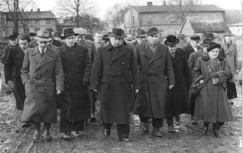 LPG Trinwillershagen, Besuch durch Walter Ulbricht Zentralbild Pietsch 3.2.1953 Walter Ulbricht besuchte die Produktionsgenossenschaft "Rotes Banner" in Trinwillershagen Der Stellvertreter des Ministerpräsidenten Walter Ulbricht, der am 30.1.1953 den Grundstein zur ersten sozialistischen Strasse in Rostock legte, besuchte am nächsten Tag die Produktionsgenossenschaft "Rotes Banner" in Trinwillershagen bei Rostock. Zur Begrüßung Walter Ulbrichts hatten sich nicht nur die 122 Genossenschaftsmitglieder, sondern werktätige Bauern aus allen umliegenden Orten eingefunden. UBz: Walter Ulbricht bei dem Besichtigungsrundgang durch die Produktionsgenossenschaft.